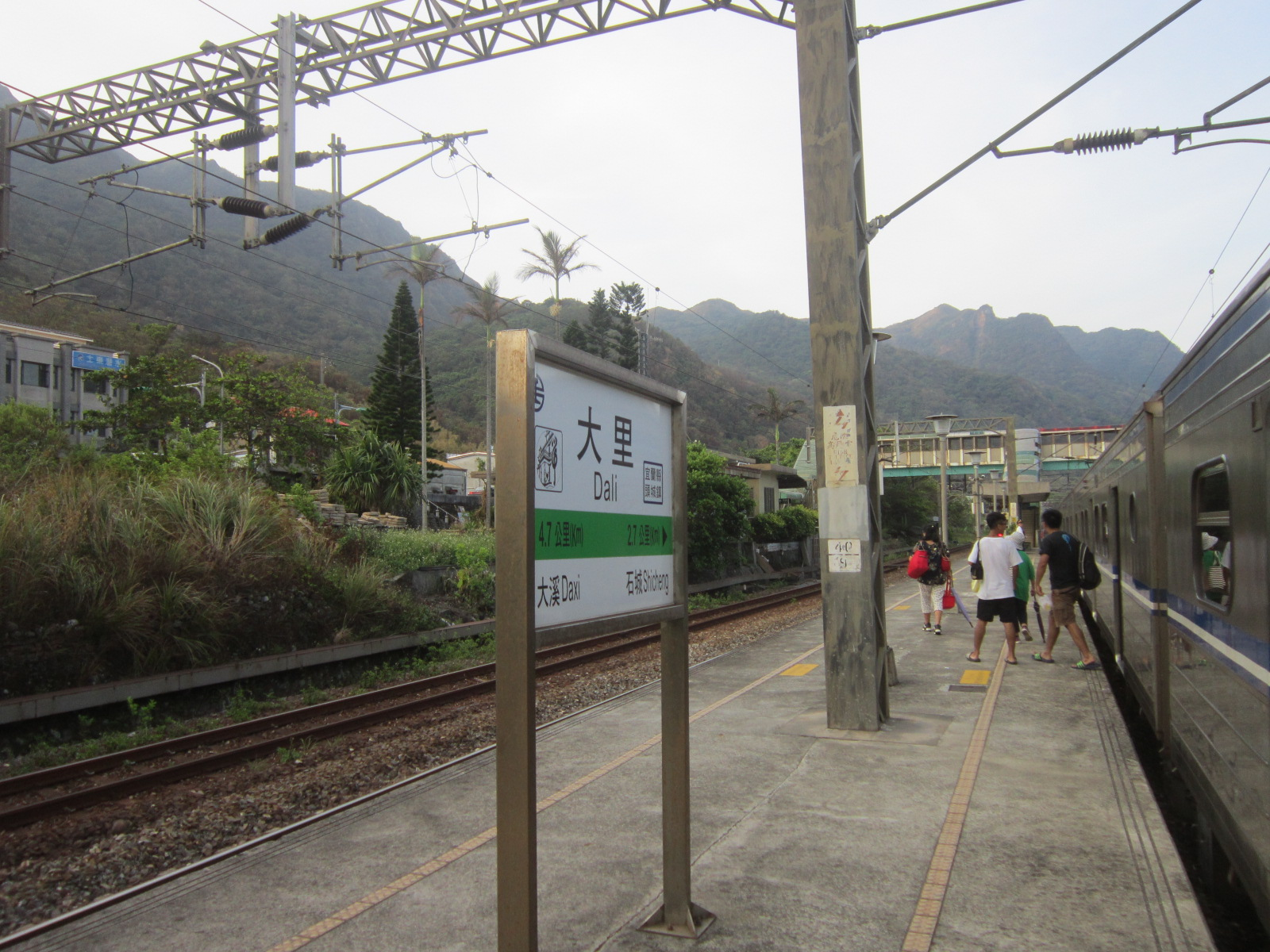 臺灣鐵路管理局EMU500型電聯車停靠大里車站第一月台。